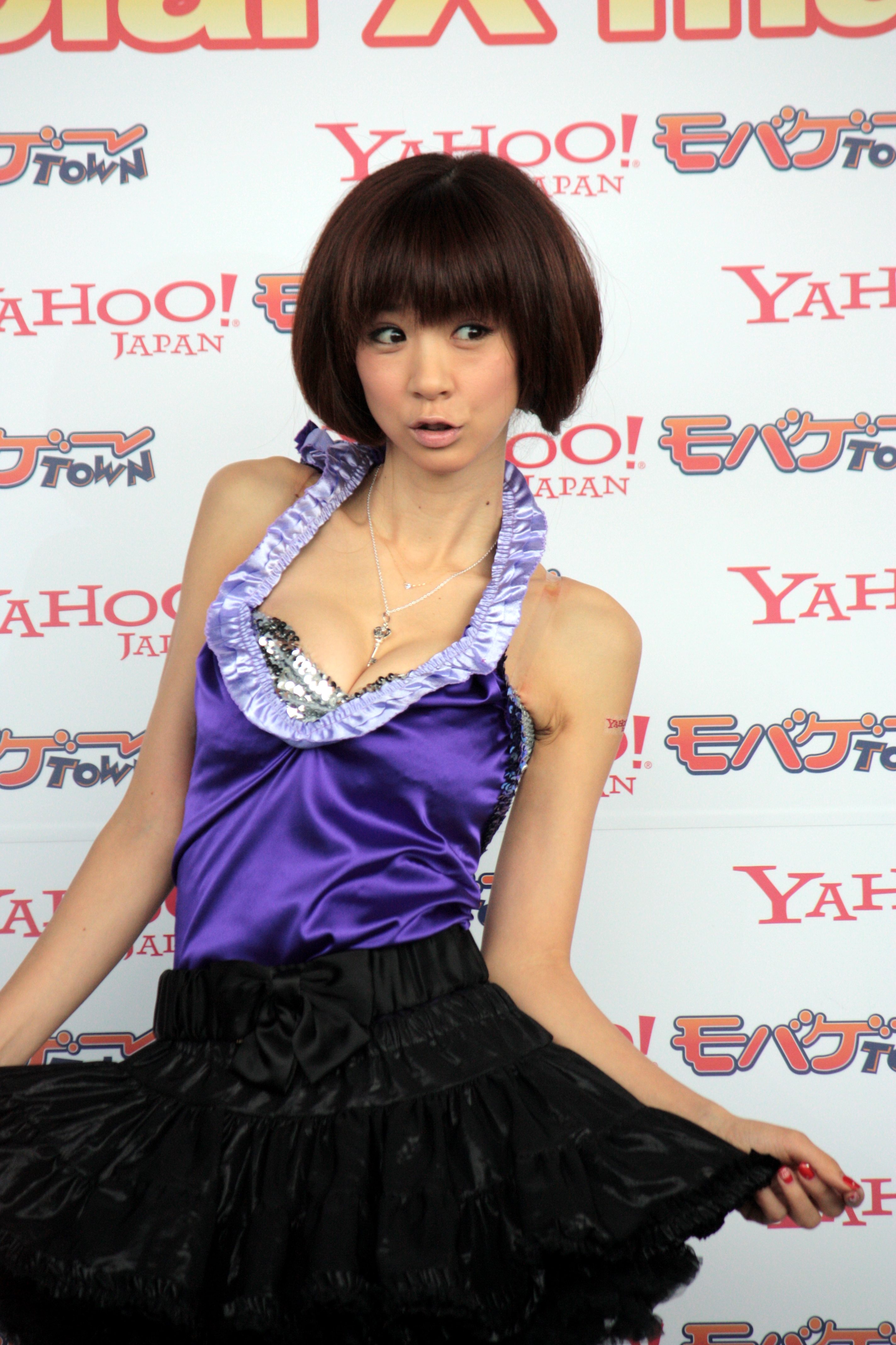 Yahoo x モバゲー 記者会見＠ヒルズ展望台